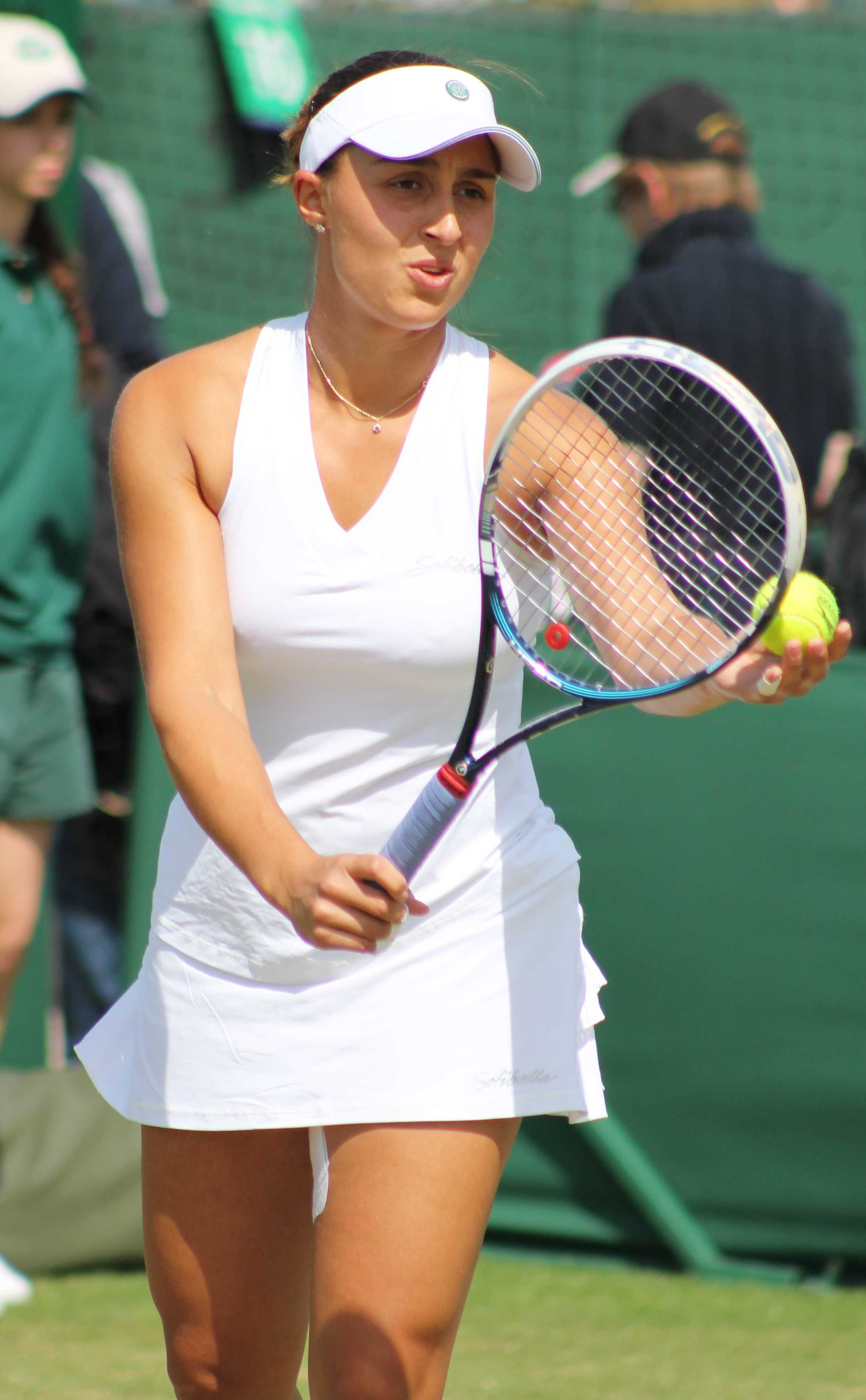 Paszek WMQ14 (1)